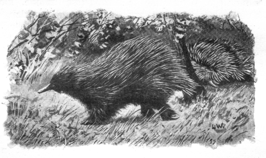 Tachyglossus aculeatus (kolczatka autralijska)